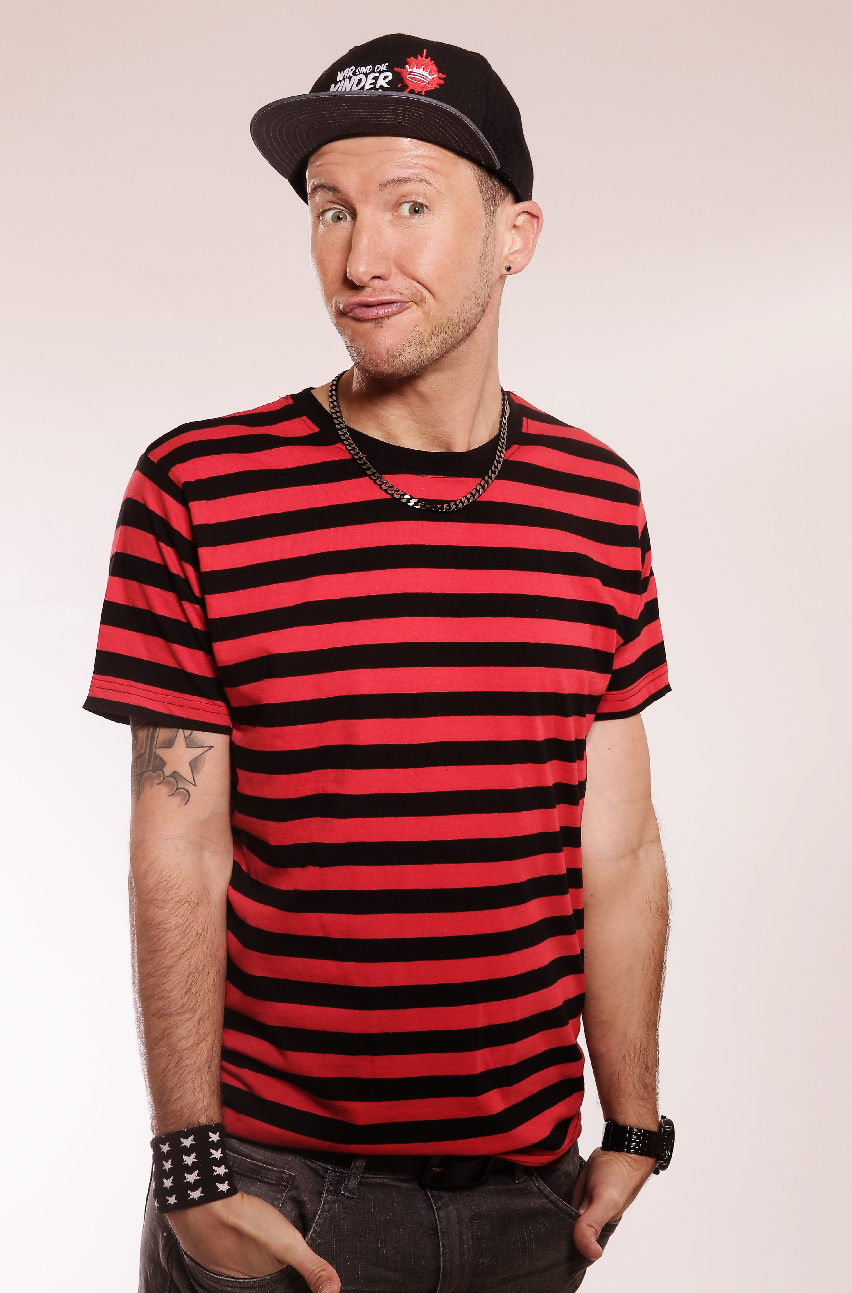 Rick Arena - Pressebild aus dem Jahr 2017